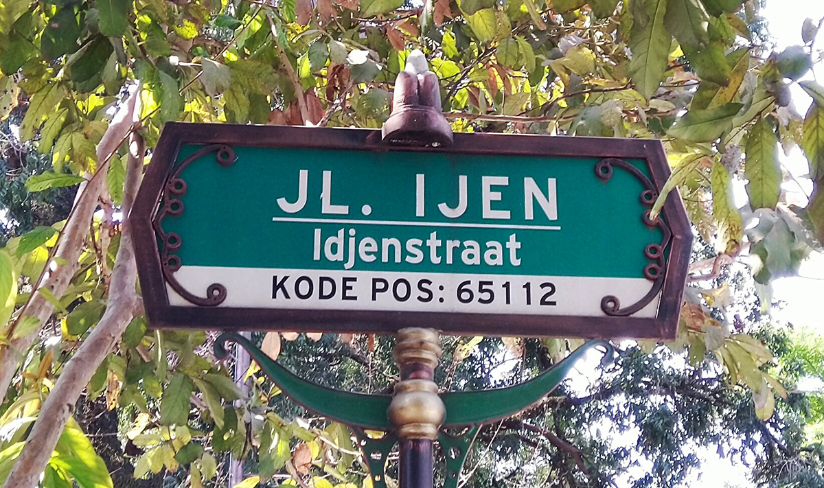 Papan tanda jalan bahasa Indonesia-Belanda di Kota Malang